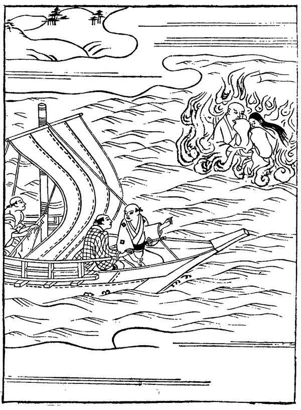 幽霊の絵